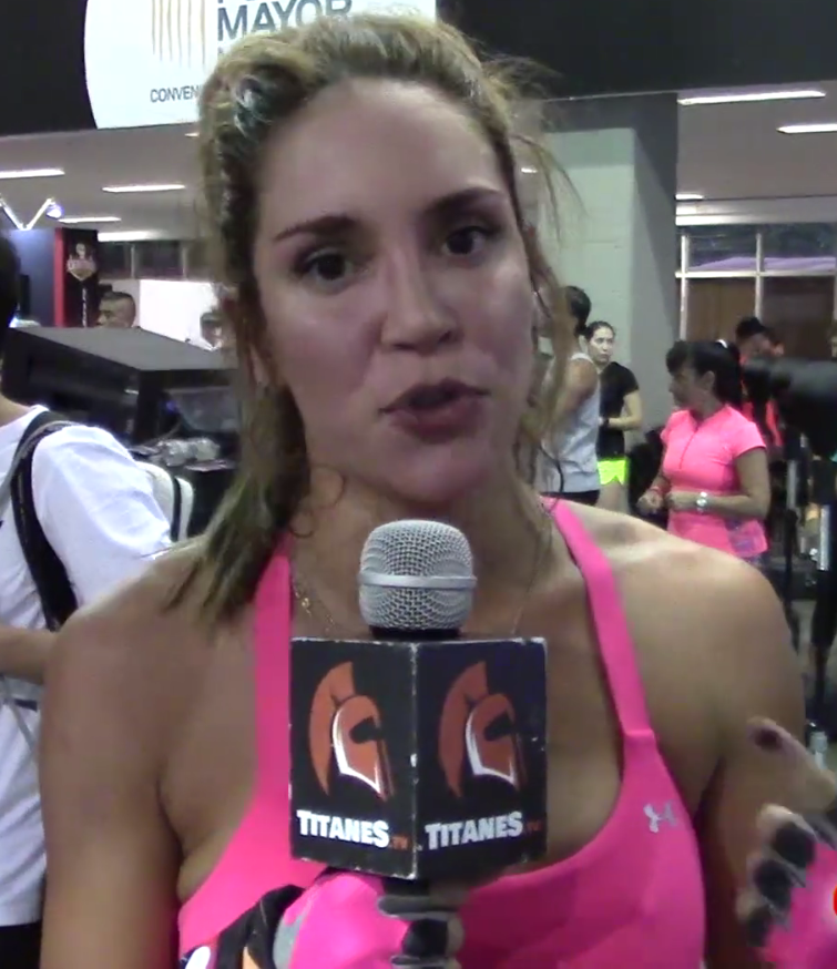 Valentina Lizcano en ExpoFitness 2016